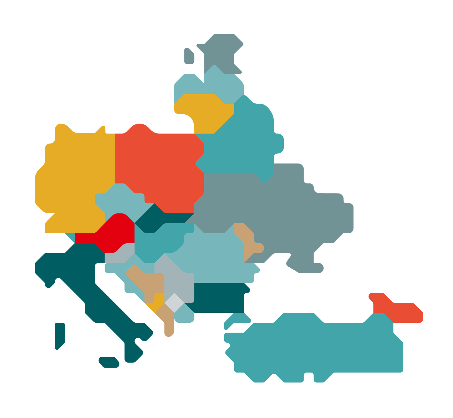 VIG in Eurpa